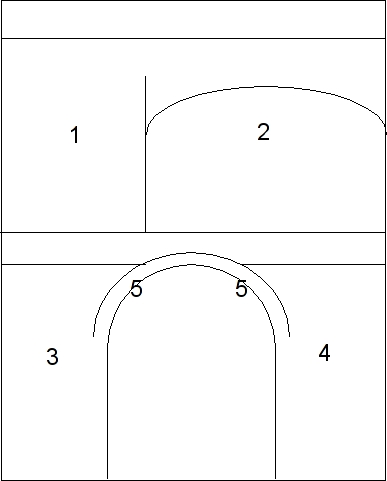 Disposition des Fresques du mur Ouest du Choeur de l'Eglise Saint-Martin de Nohant-Vic